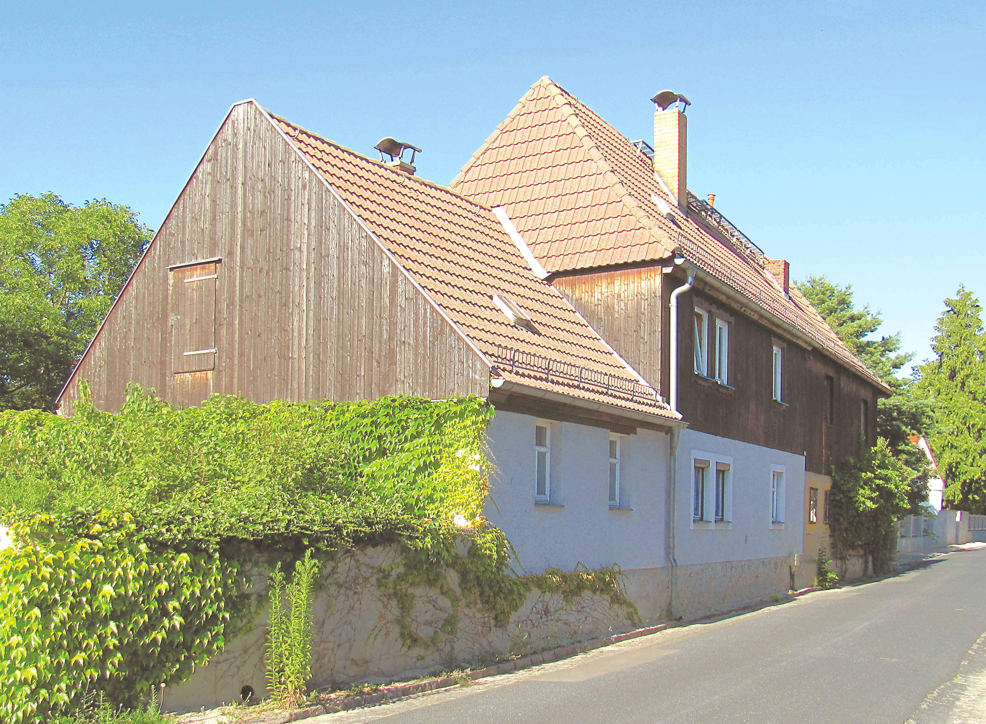 Radebeul, Winzerhäuser Hofmann (Westseite)